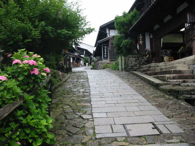 中山道馬籠宿